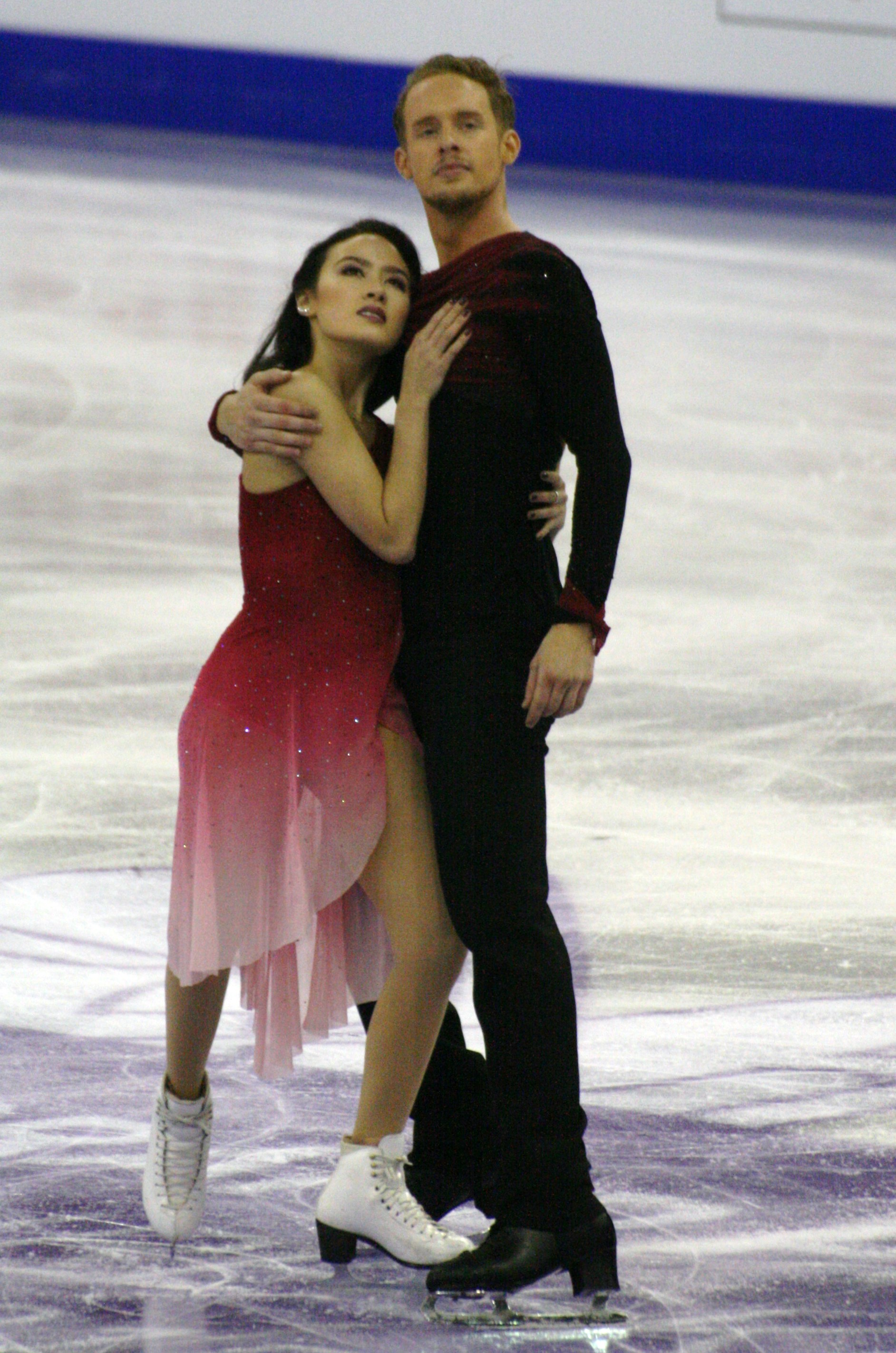 Мэдисон Чок и Эван Бейтс (США) на финале Гран-при по фигурному катанию 2015-2016.